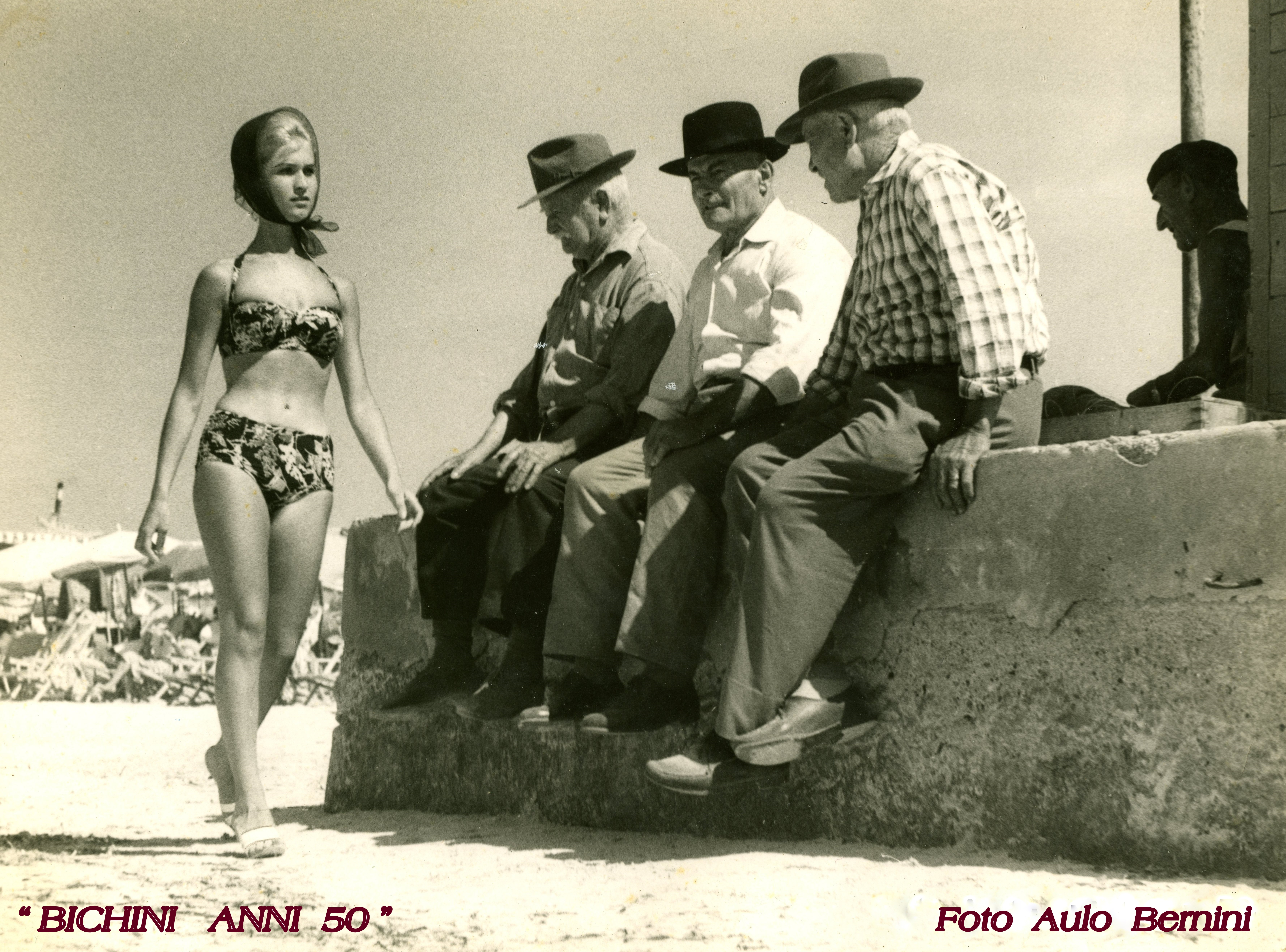 Vada: bagnante in bikini